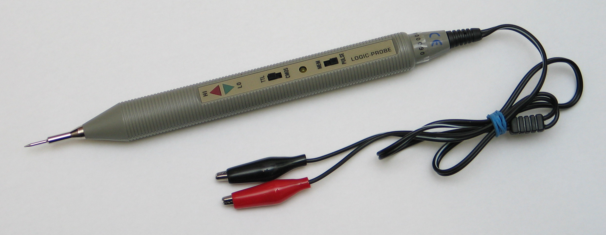 Logic probe for digital circuits